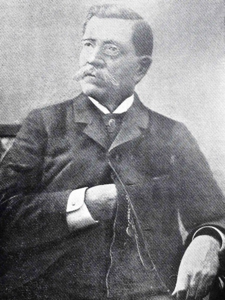 Foto de Dr. Adolf Ernst en la Gaceta Muskus, Caracas, No. 36, octubre 1932.